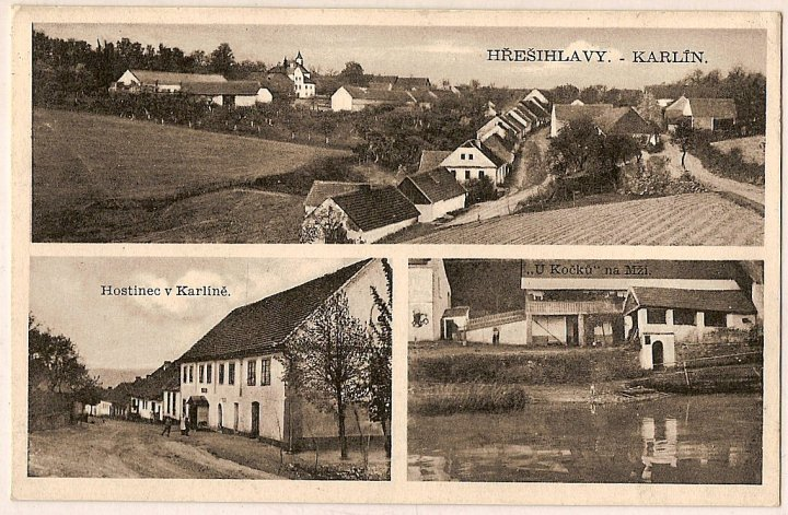 Dobová pohlednice obce Hřešihlavy.